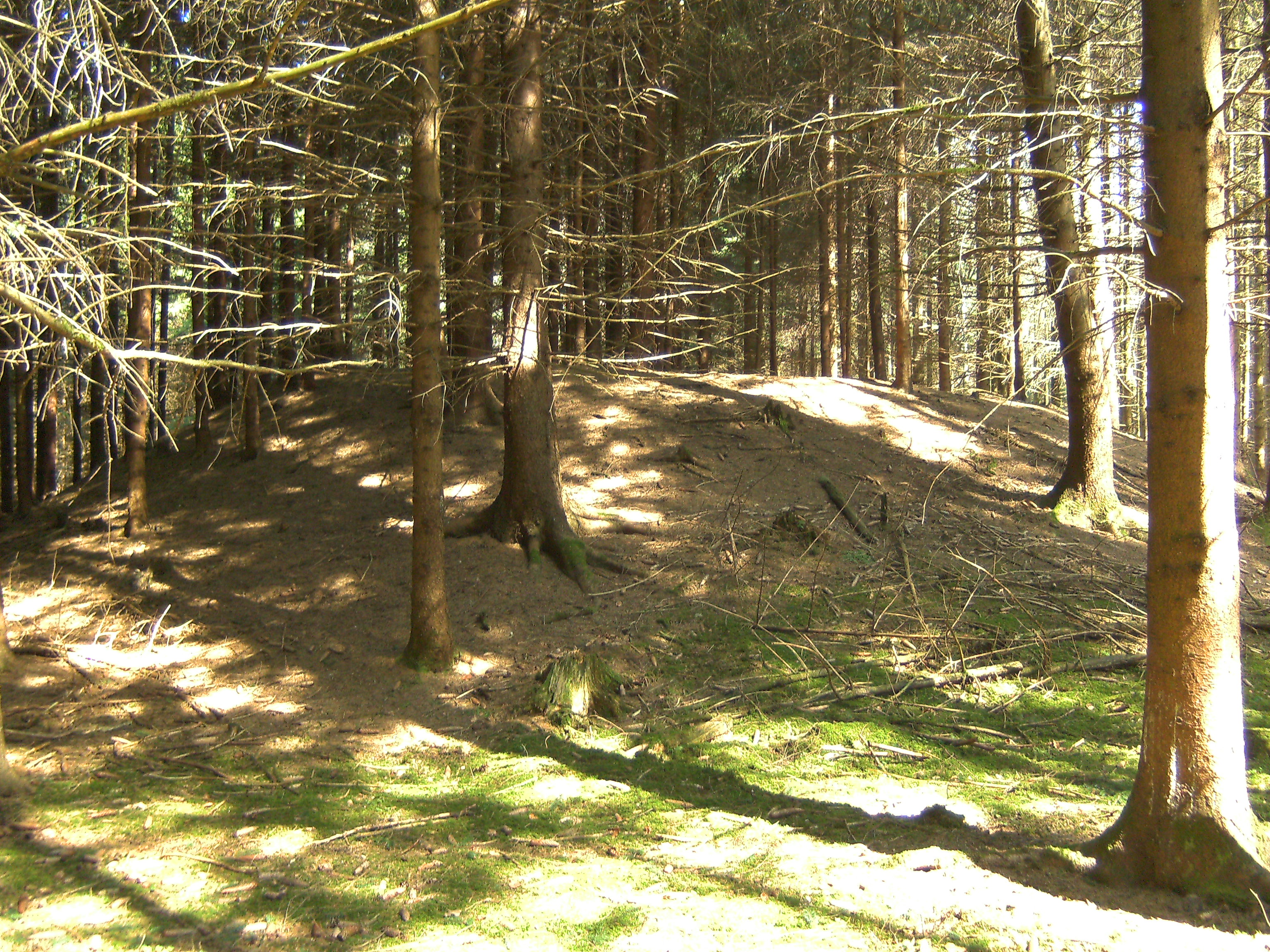 Hügelgräber im Illertal bei Tannheim